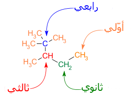 رابطة كربون-كربون، 3،2،2-ثلاثي ميثيل البنتان